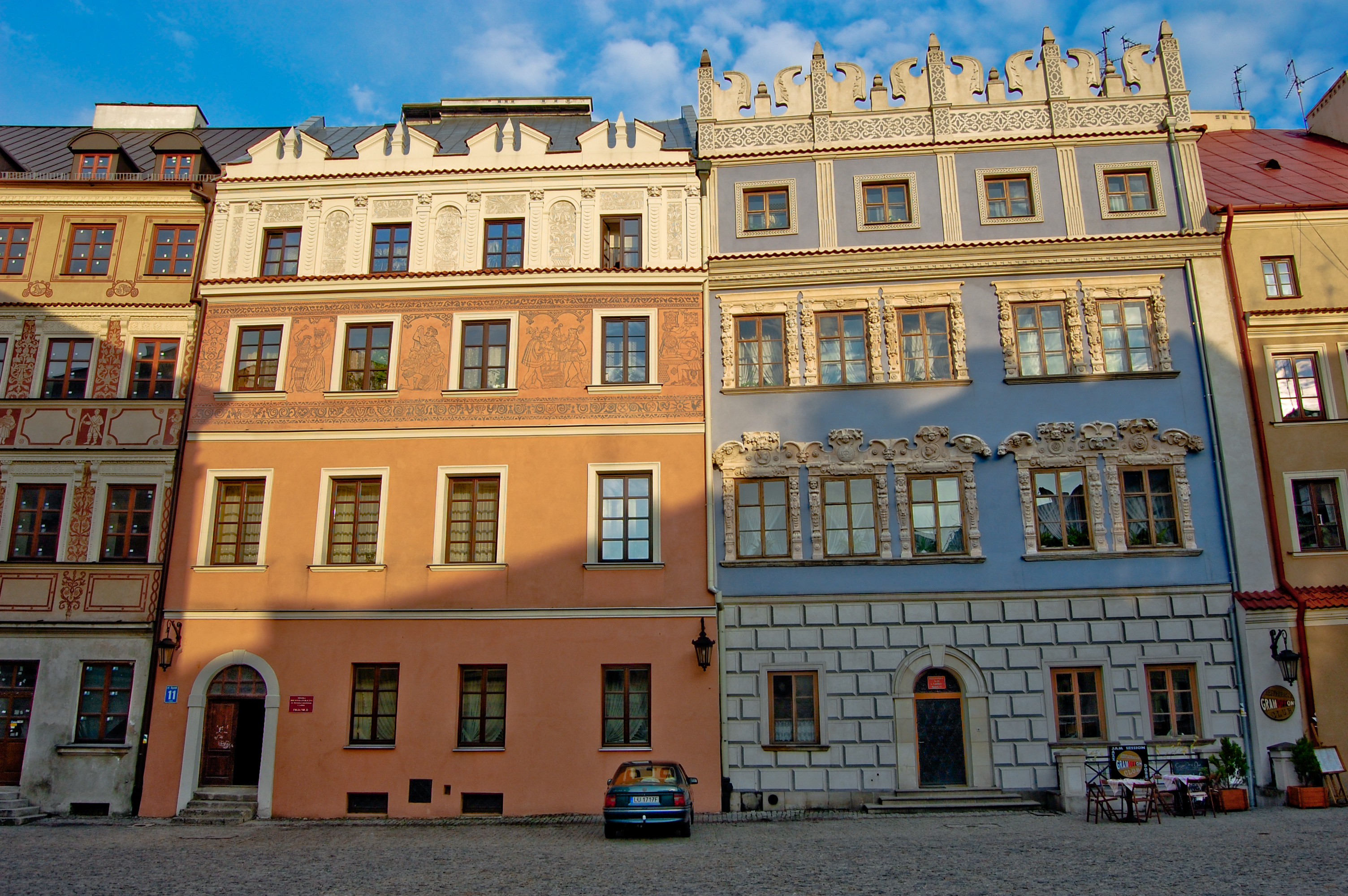 Kamienice na rynku Starego Miasta w Lublinie, po prawej stronie kamienica Konopniców.